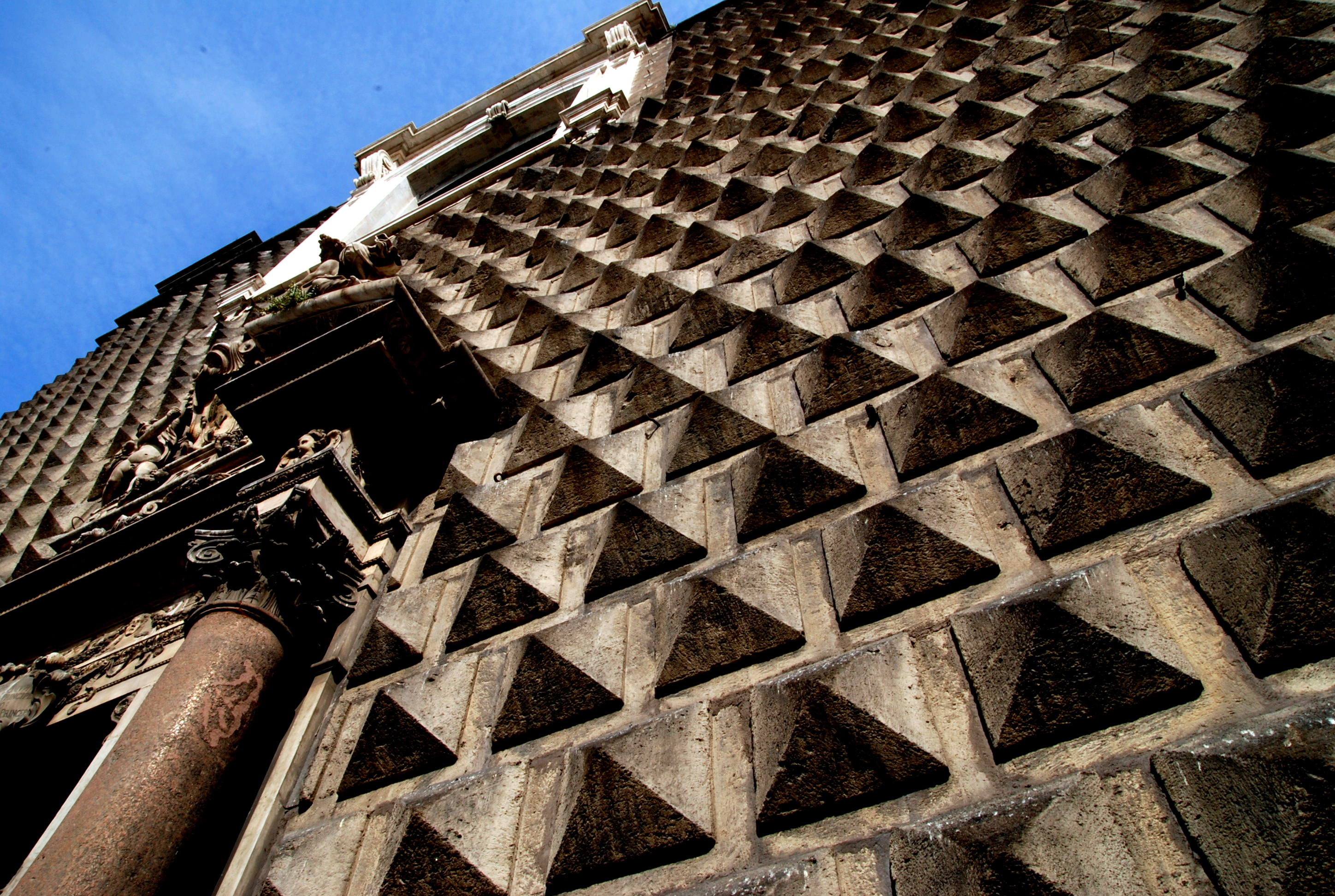 la facciata del gesù nuovo